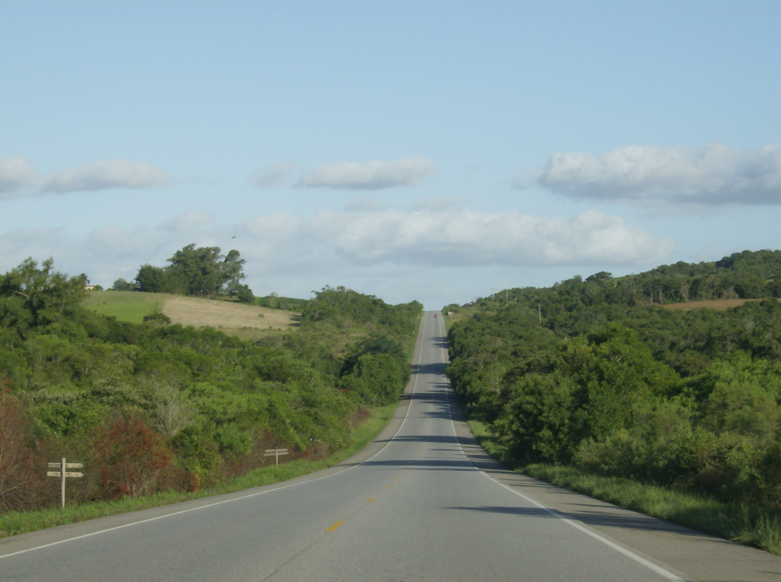 A road (BR-293) in Cerrito, Rio Grande do Sul state, Brazil.